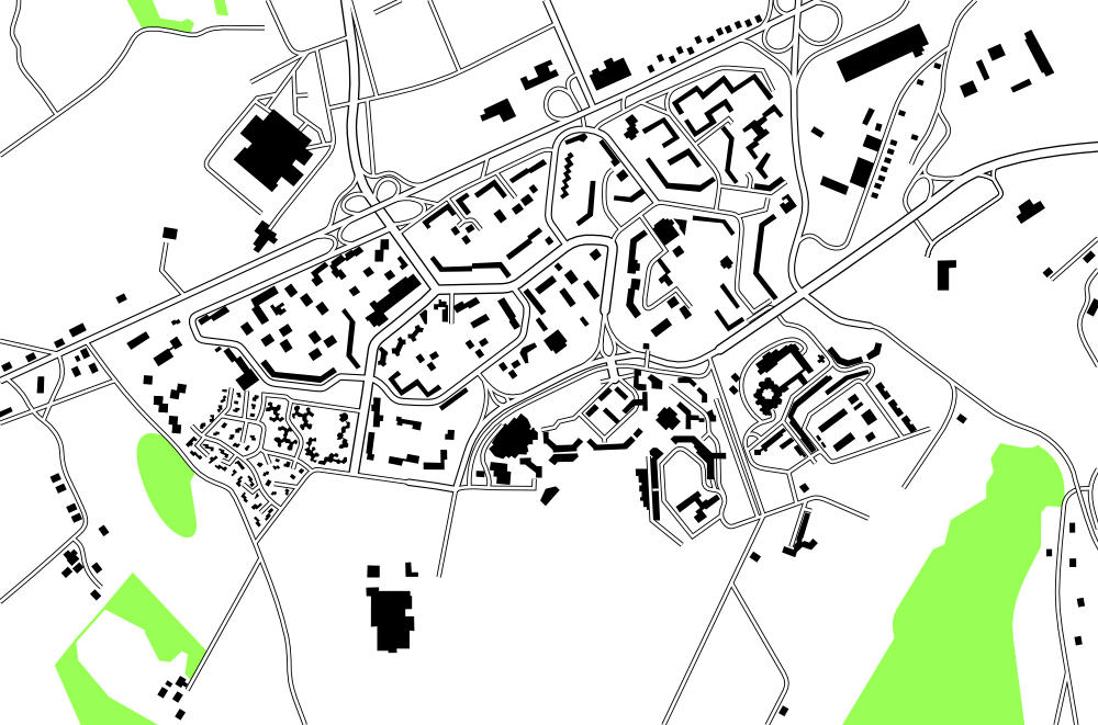 Plan du quartier de Planoise à Besançon réalisé à partir des cadastres de 1986.